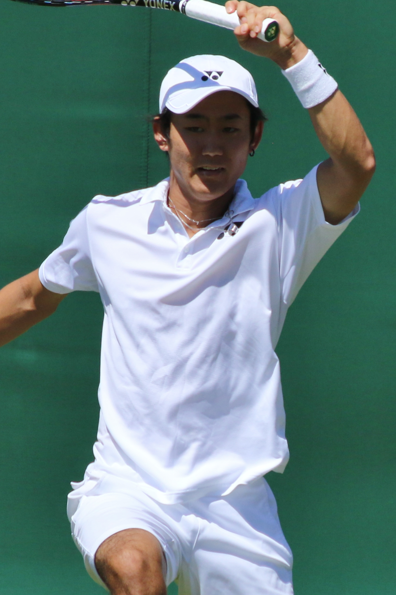 Nishioka WM18 (38)